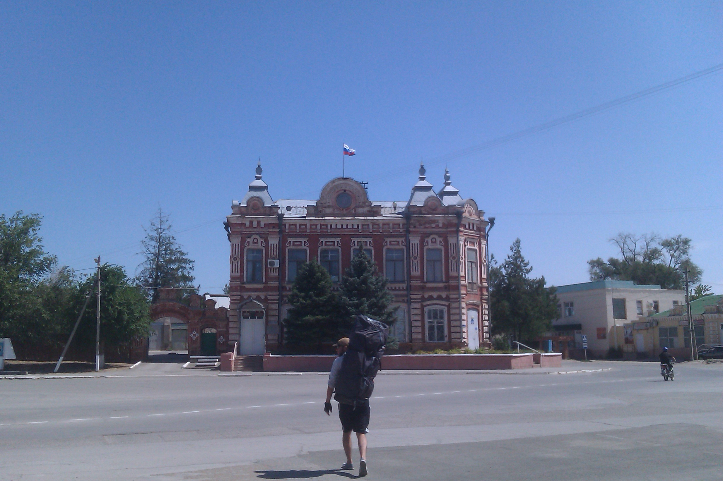 Ул. Ленина в г. Ленинск, Волгоградская область